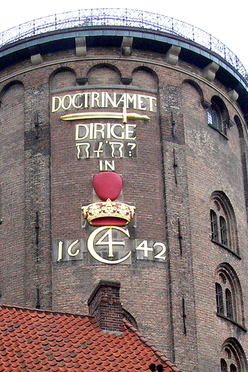 Bilderrätsel (Rebus) am Runden Turm, Kopenhagen. Doctrinam et justitiam dirige, Jehova, in Corde coronati regis Christiani Quarti Aufnahme Christian Bickel, 2007